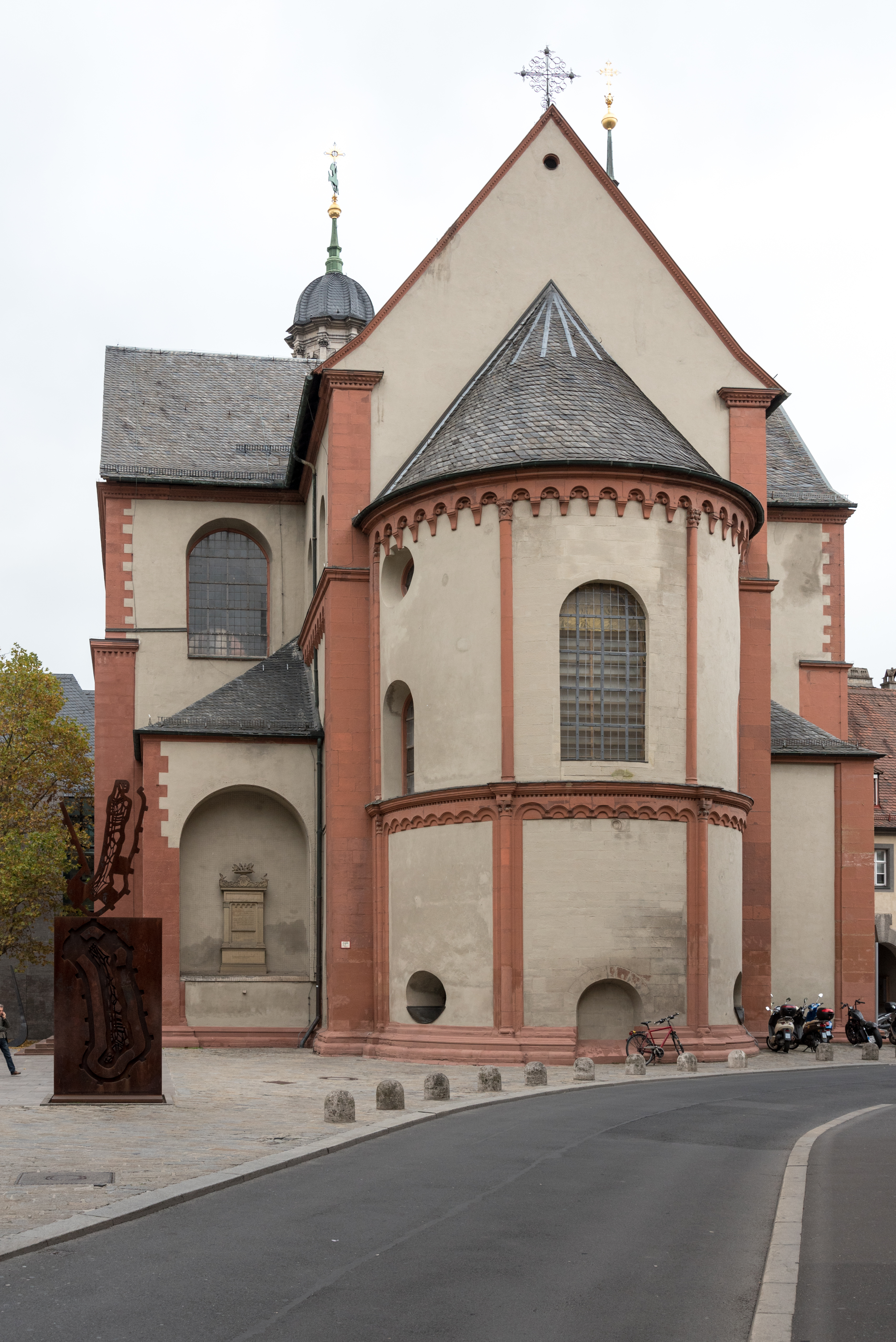 Würzburg, Neumünster